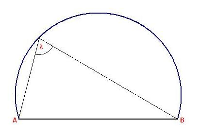 Arco capaz, arco de gran utilidad en el dibujo técnico